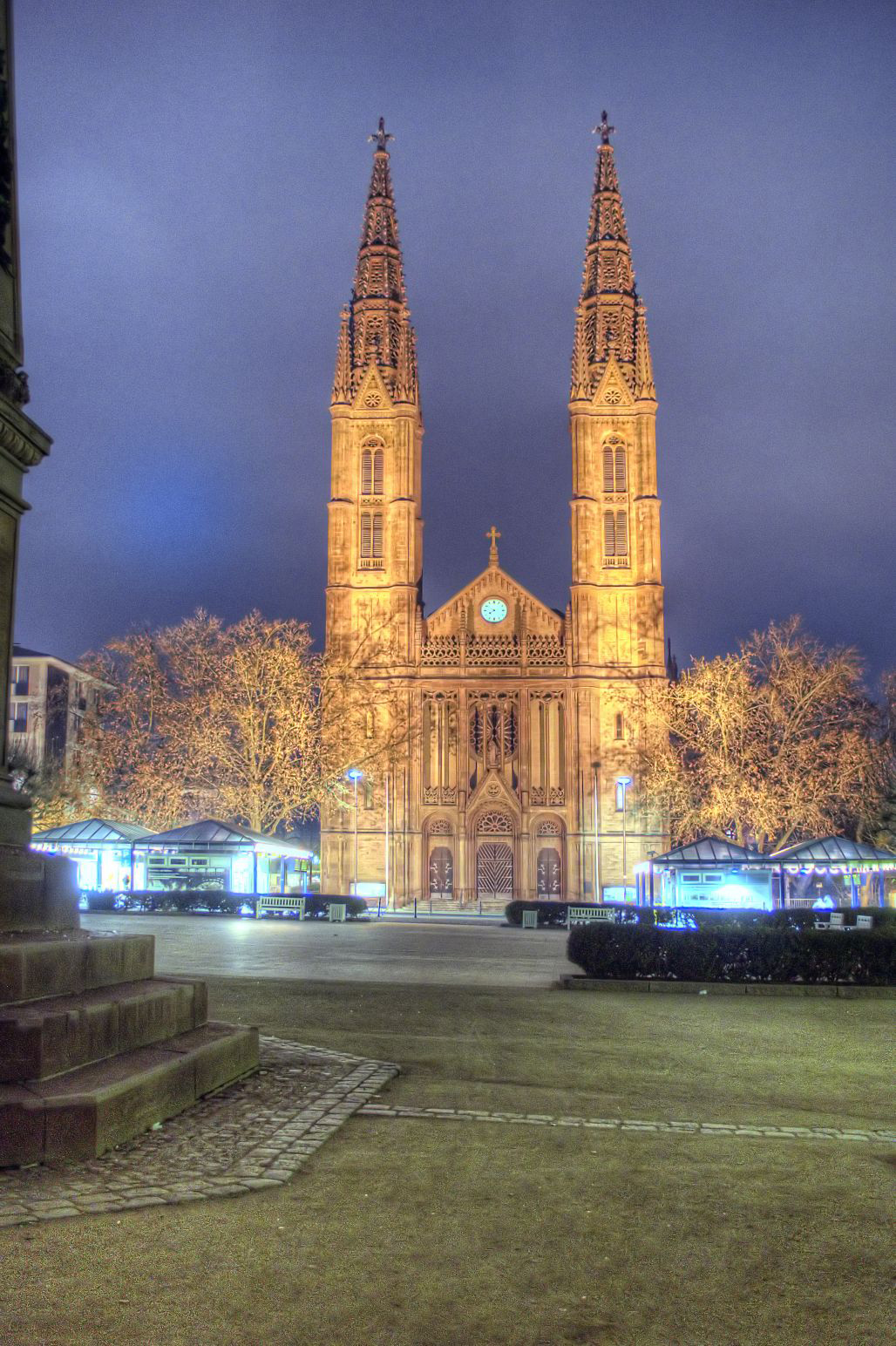 Die von 1844 bis 1849 erbaute Bonifatiuskirche am Luisenplatz der kreisfreien Stadt Wiesbaden in Hessen, Deutschland.